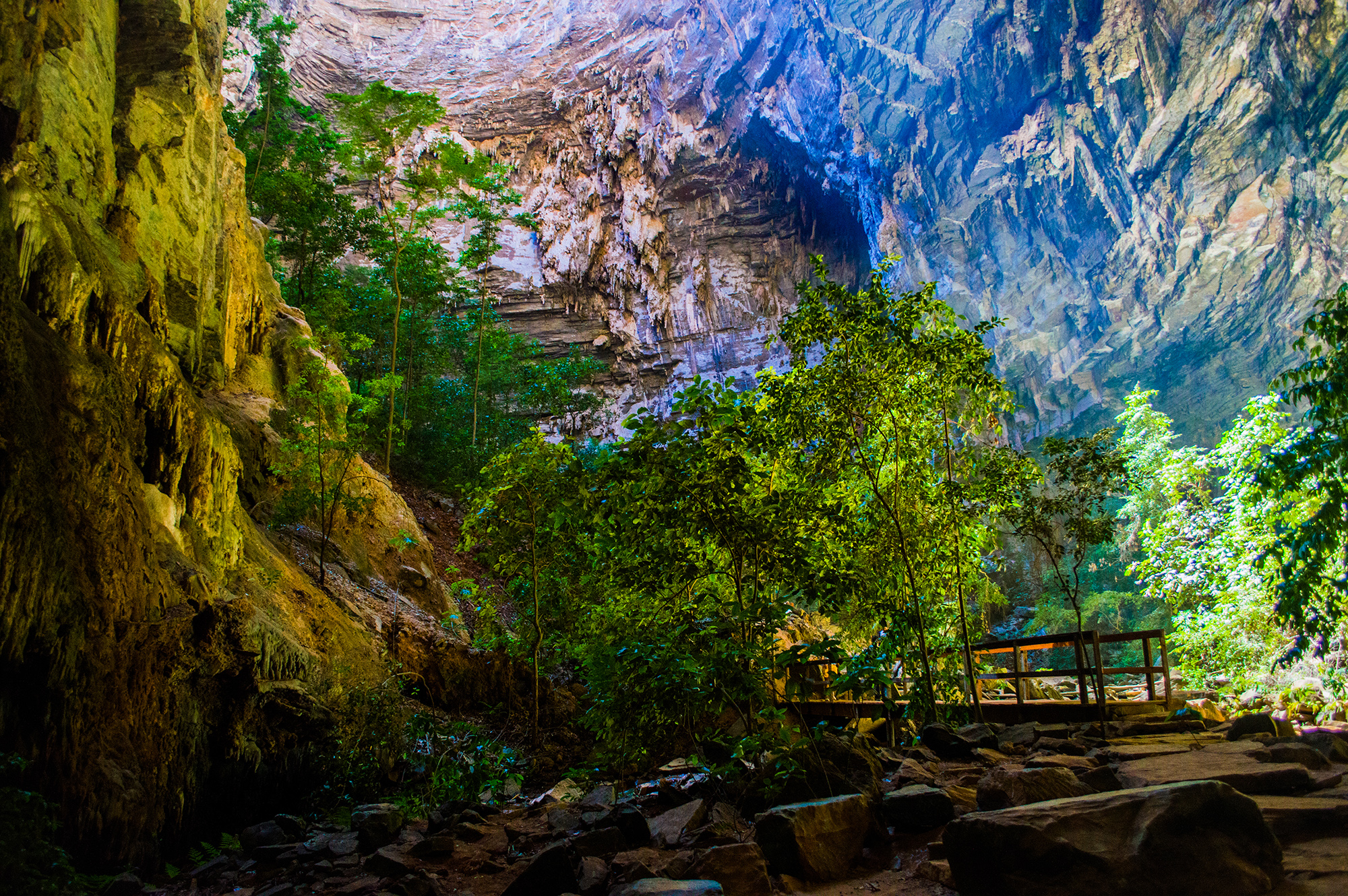 Parque Nacional Cavernas do Peruaçú/Minas Gerais